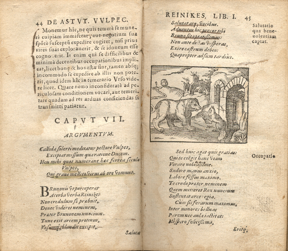 Reineke Fuchs, Ausgabe in lateinischer Sprache